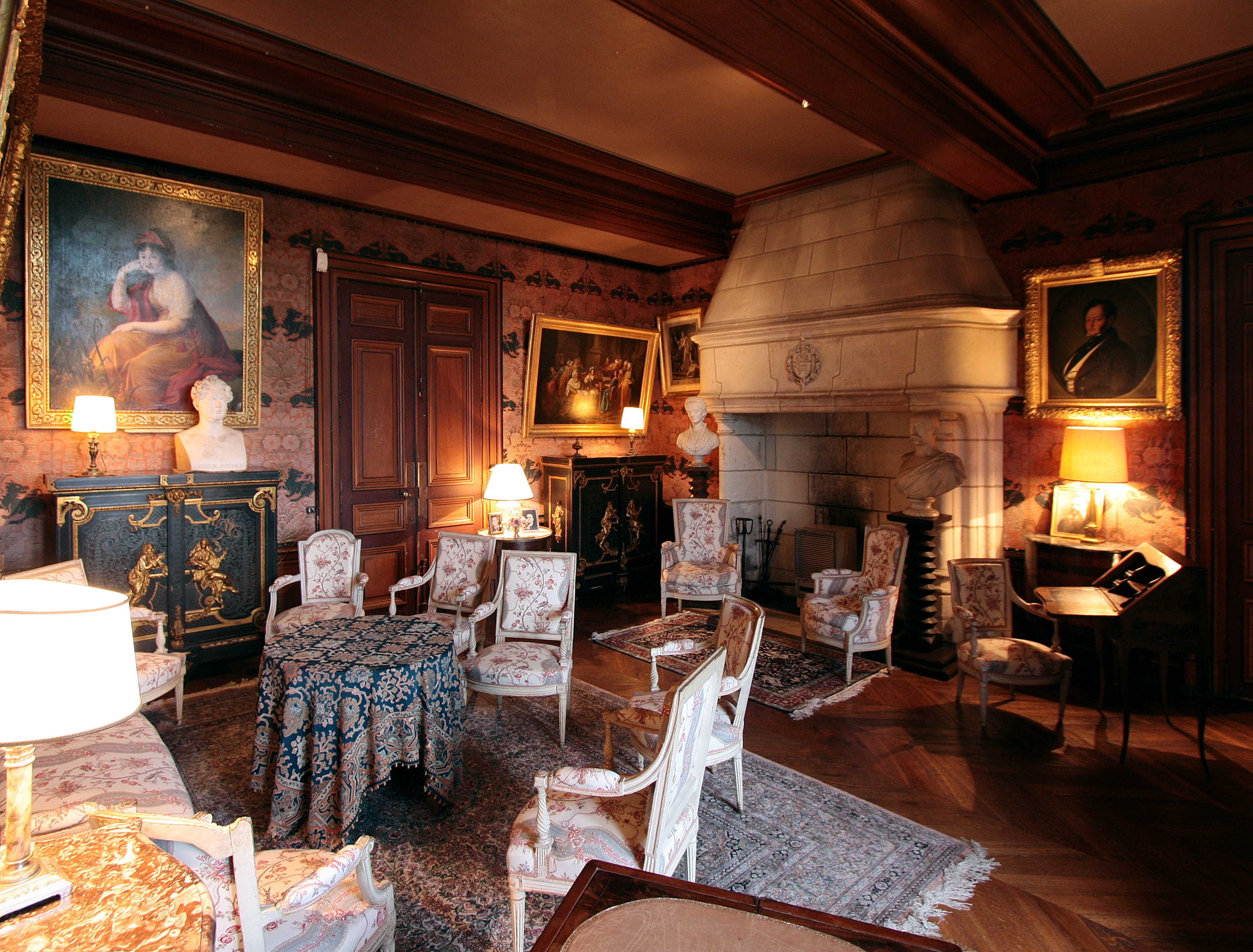 Schloss Montrésor im Département Indre-et-Loire/Frankreich - Kleiner Salon.